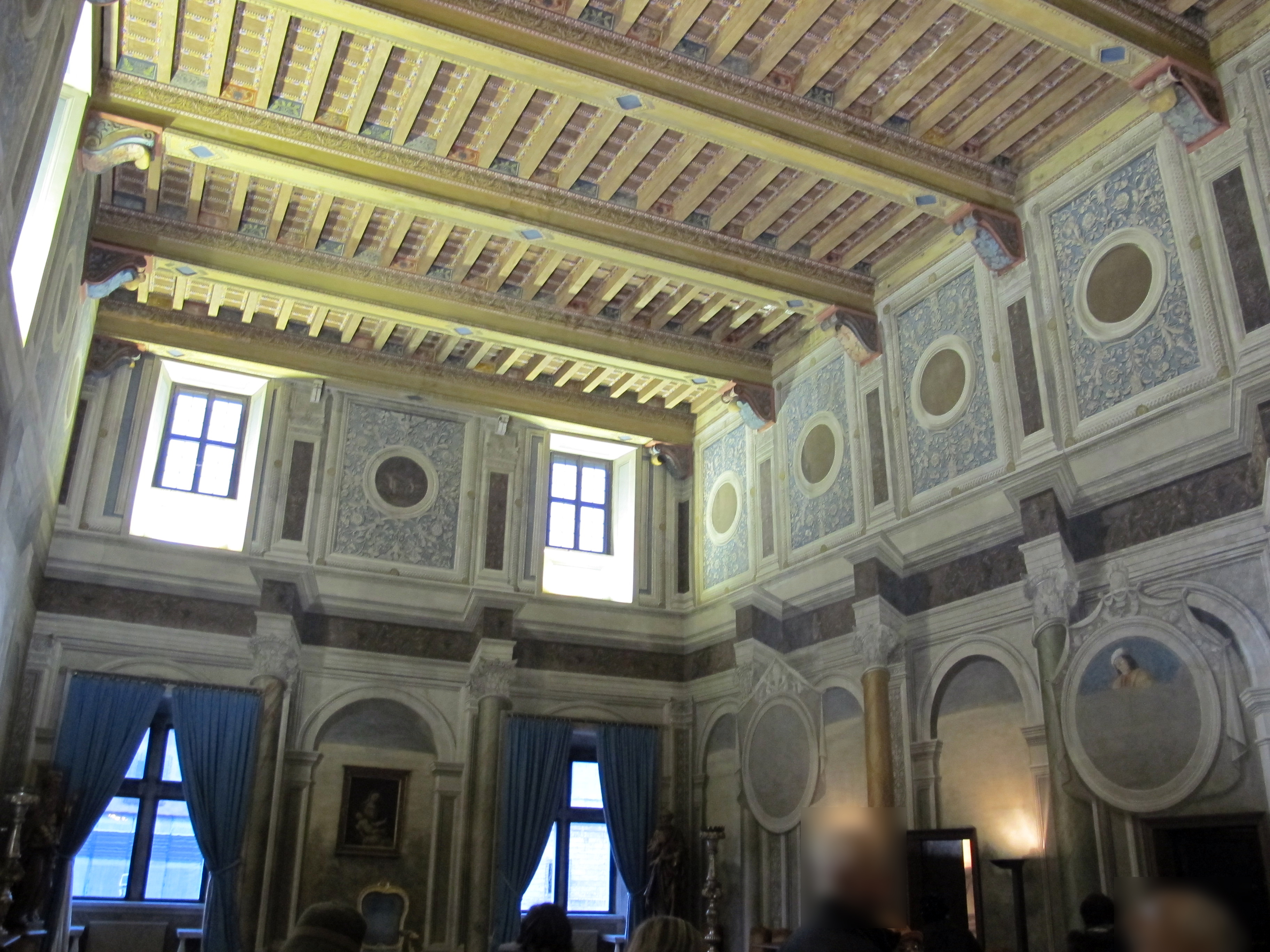 Palazzo dei Penitenzieri - Interno